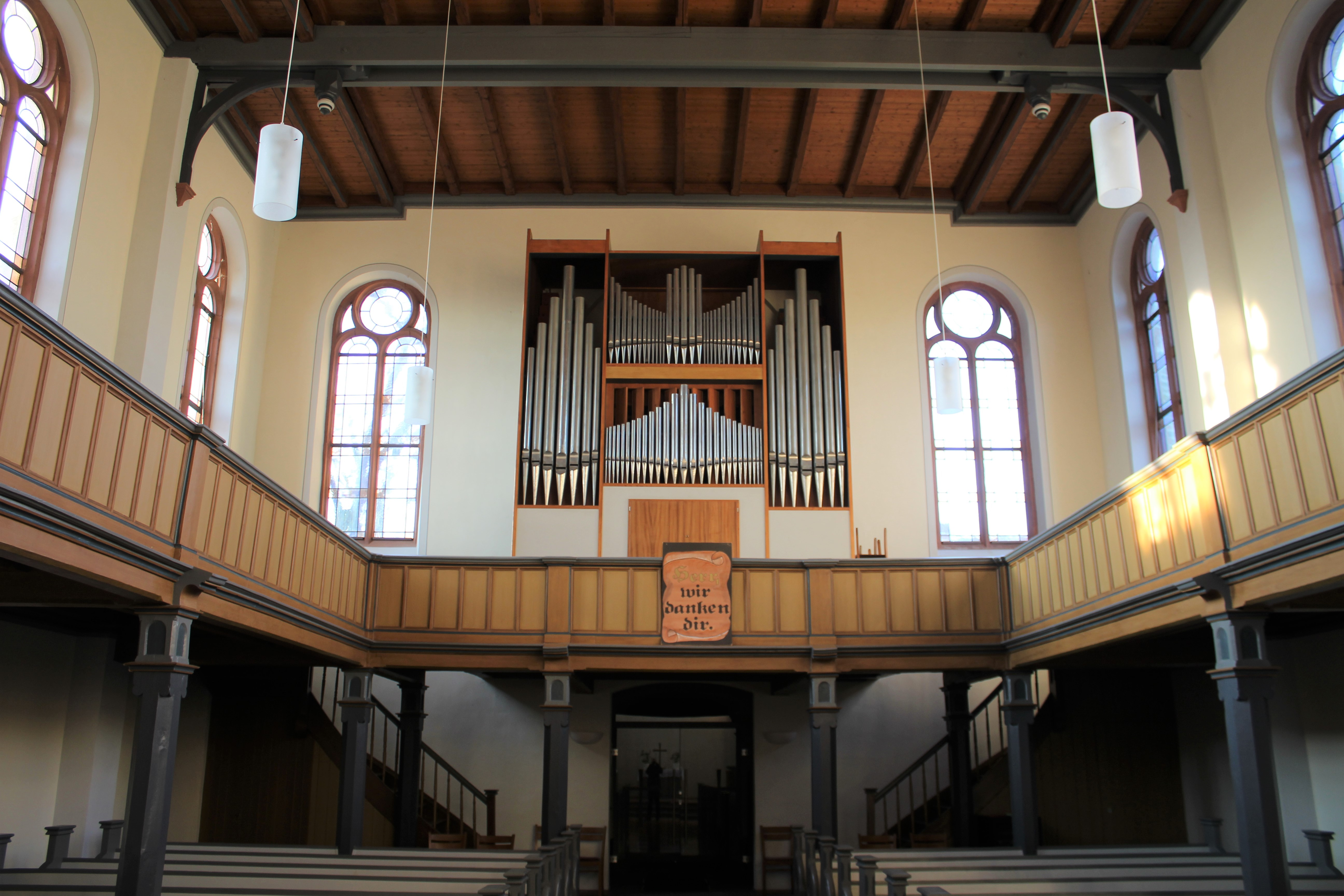 Evangelische Kirche Biskirchen, Gemeinde Leun, Lahn-Dill-Kreis, Hessen, Deutschland